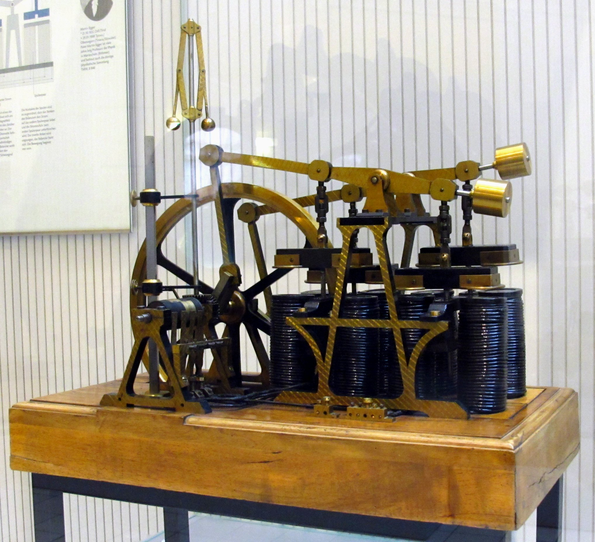 Bei diesem nach dem Prinzip der Dampfmaschine konstruierten Elektromotor wird die Kraft des Dampfes durch elektromagnetische Kräfte ersetzt. Konstrukeur: Martin Egger Baujahr: ca. 1880